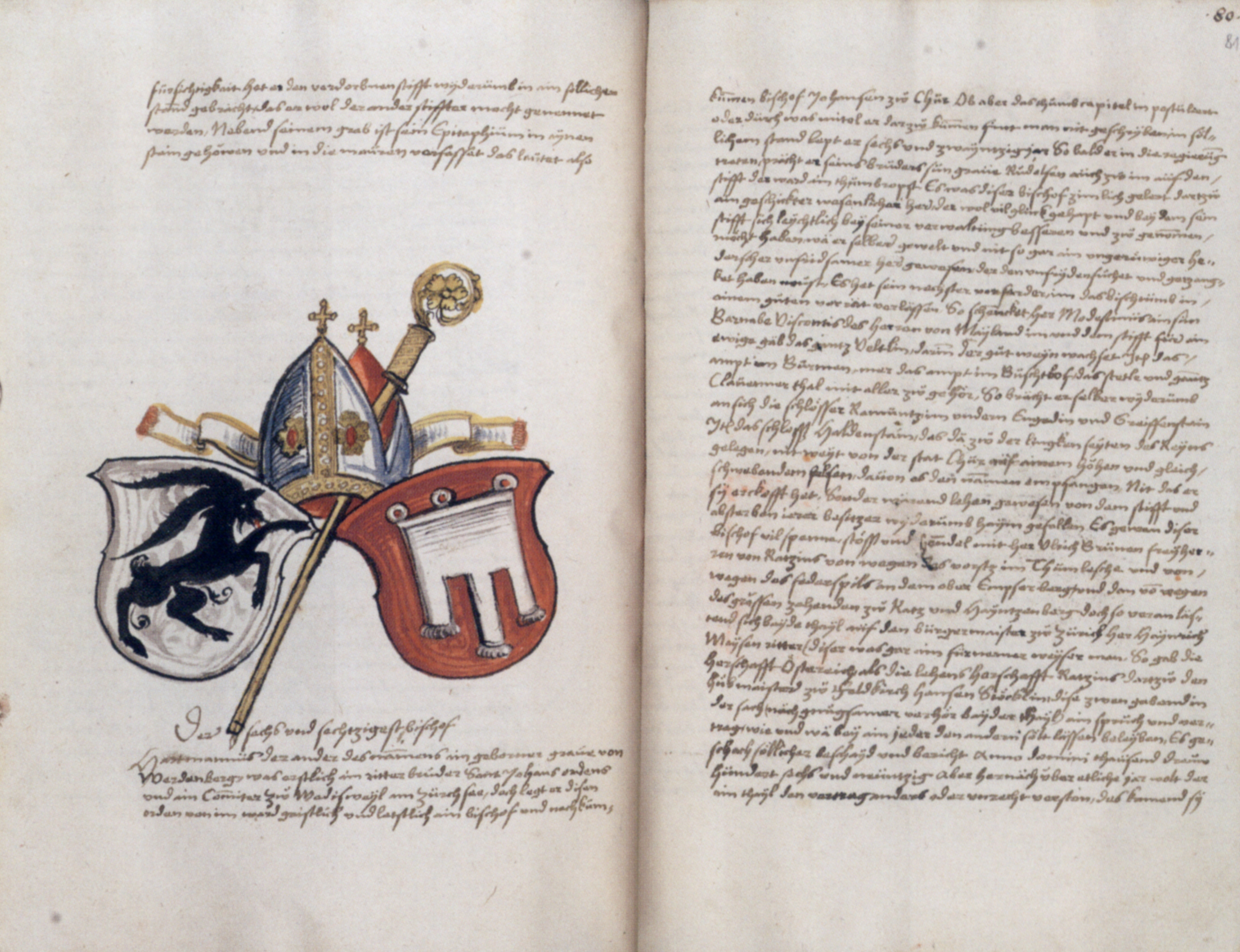 Geschichte der Bistümer Chur, Hildesheim und Paderborn. Papier, 28.5 x 20 cm. Stuttgart, Württembergische Landesbibliothek, HB V 33; hier: fol. 80v, Wappen des Bischofs von Chur, Hartmann von Werdenberg